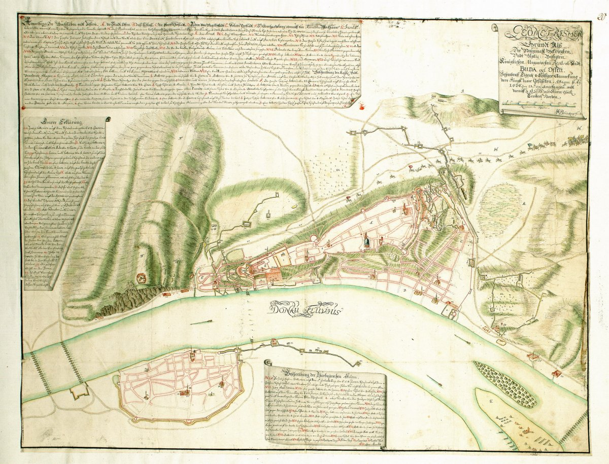 Grundriss der Festungen von Buda und Ofen bei der Belagerung durch die Bayern, 2. Juni bis 2. September 1686; Kupferstich, koloriert; 750x570 mm, Maßstab: 90 rheinländische Ruthen = 9,4 cm [1:10.000]